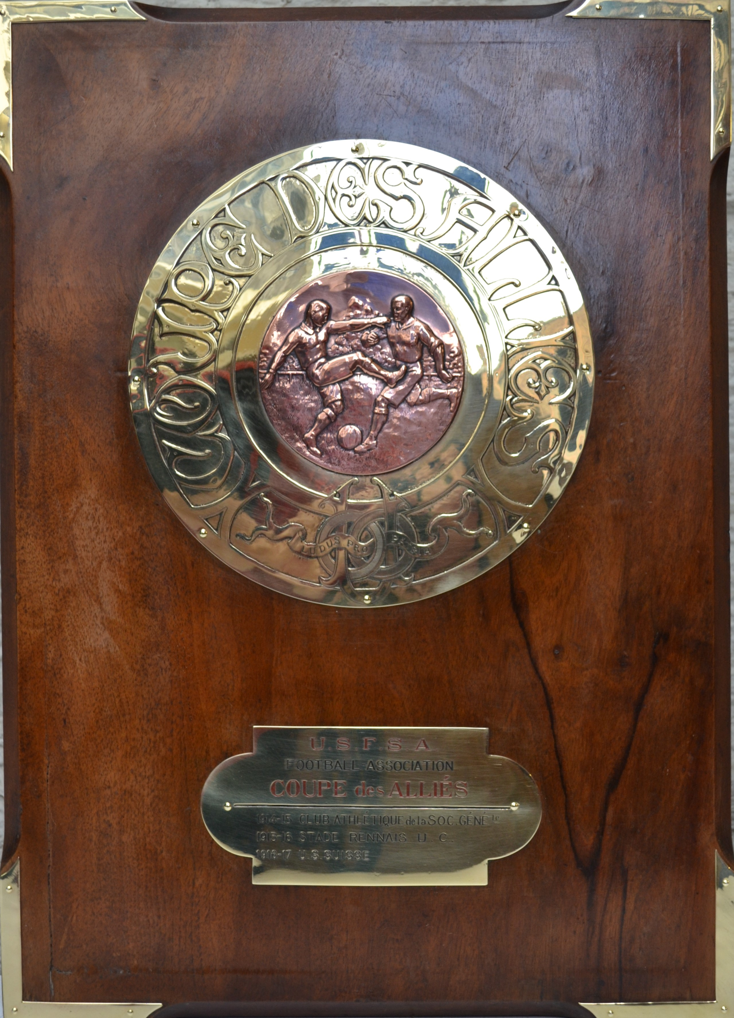 Trophée Coupe des Alliés, support bois, plaque centrale en laiton et cuivre, plaque en bas laiton et patine couleur dans les lettres